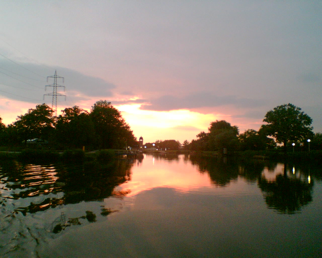 Extraschicht 2007 Schiffshebewerk Henrichenburg - Fahrt auf dem Dortmund-Ems-Kanal mit Blick auf den Schleusenpark Waltrop